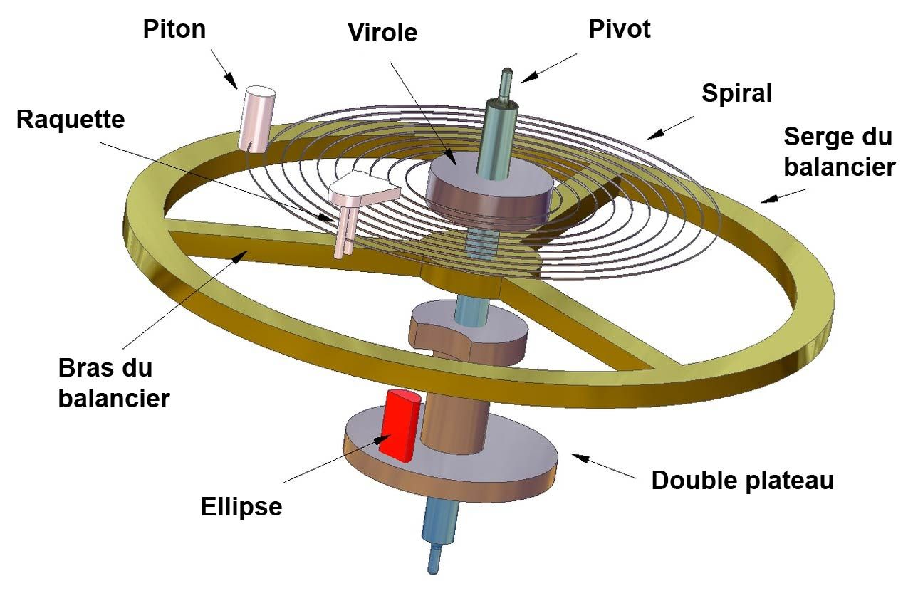 Noms des différentes parties d'un balancier-spiral (horloger)